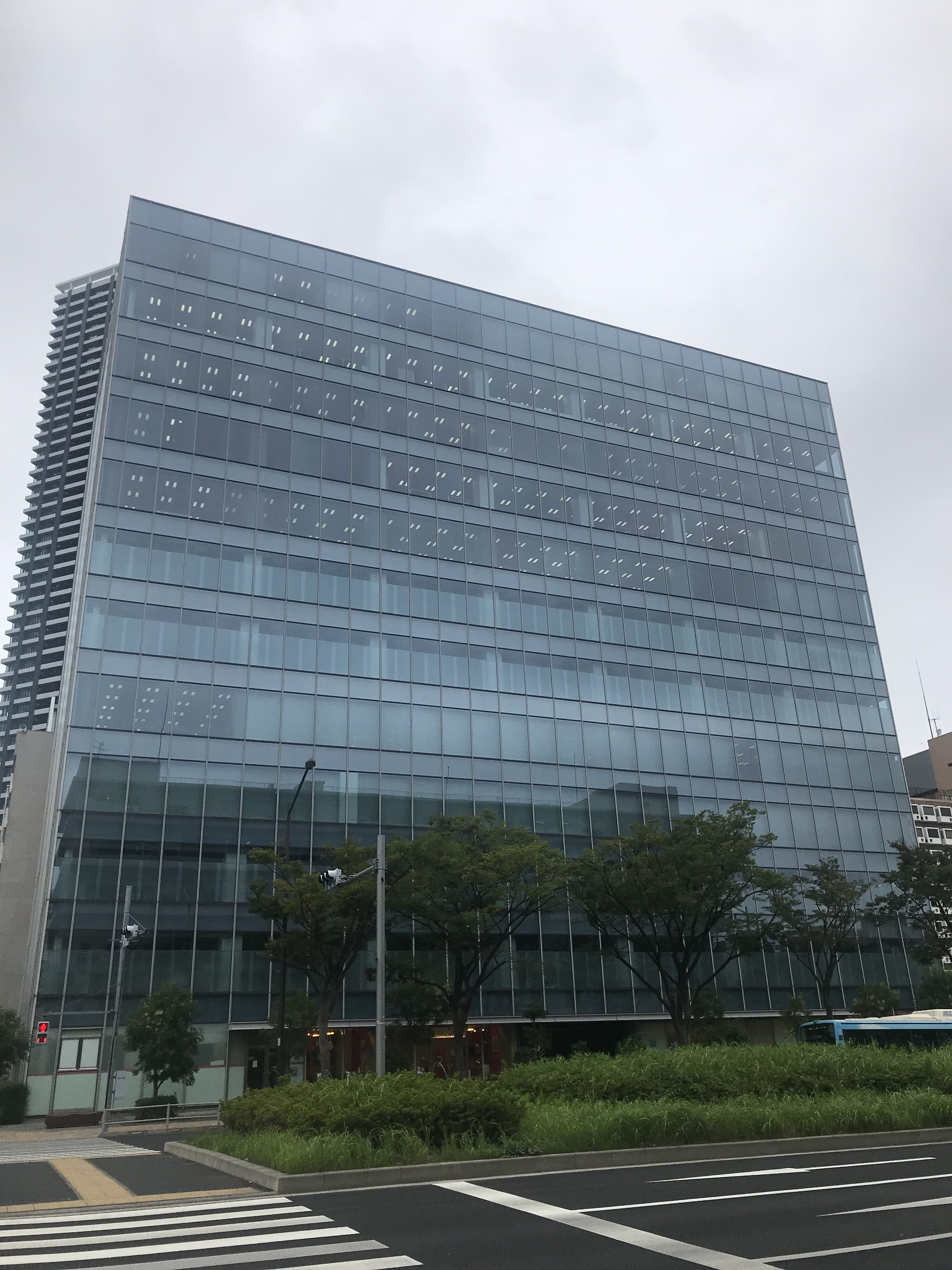 Ｄａｉｗａ晴海ビル